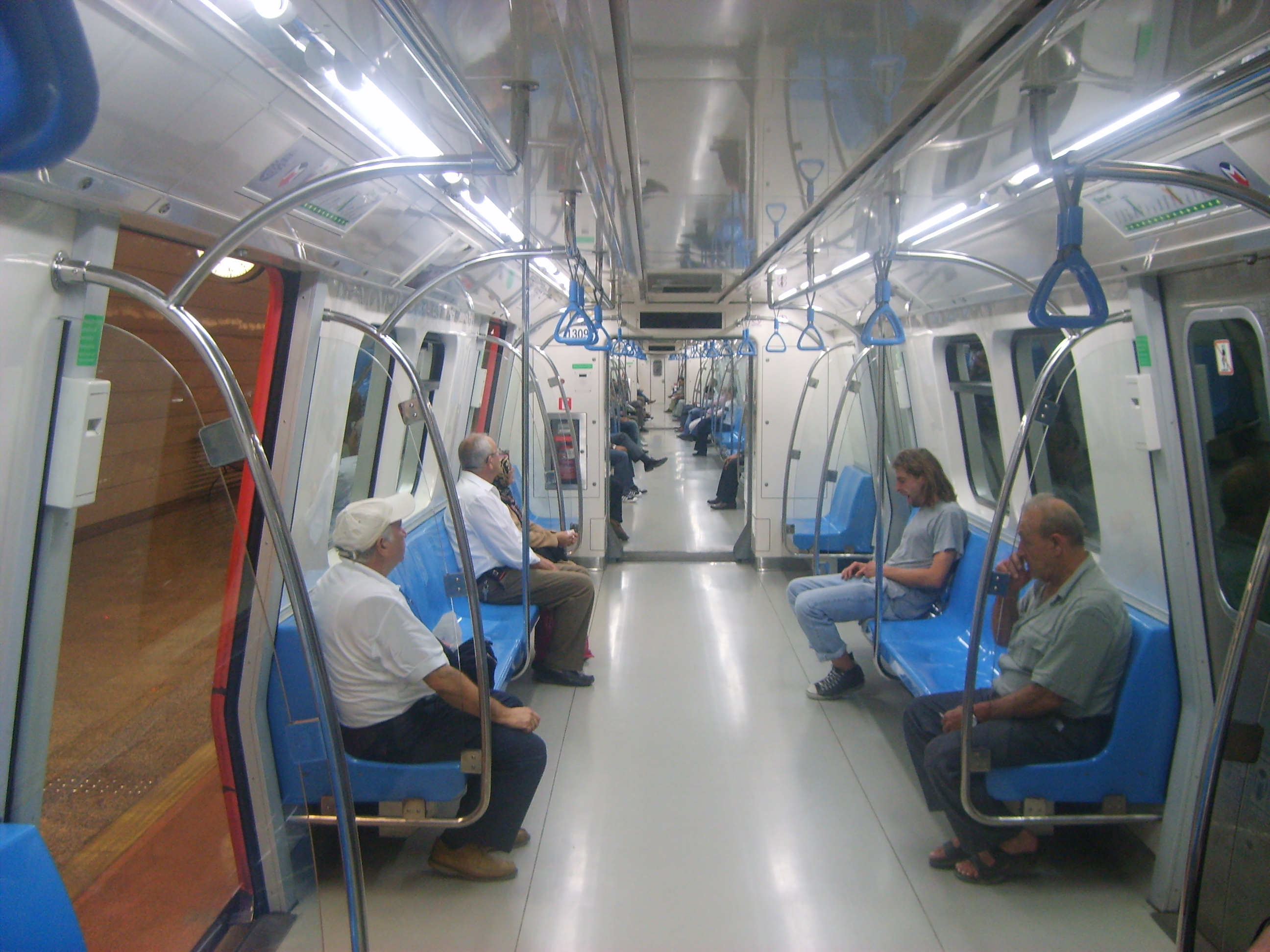 İstanbul, raylı sistemler istanbul metrosu